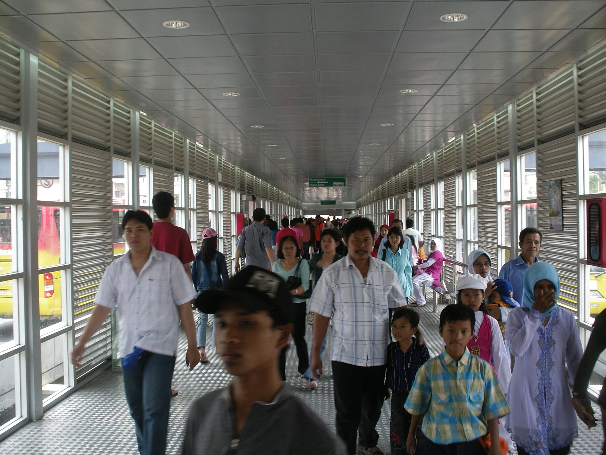 Innenansicht des zentralen Umsteigepunkts Harmoni.